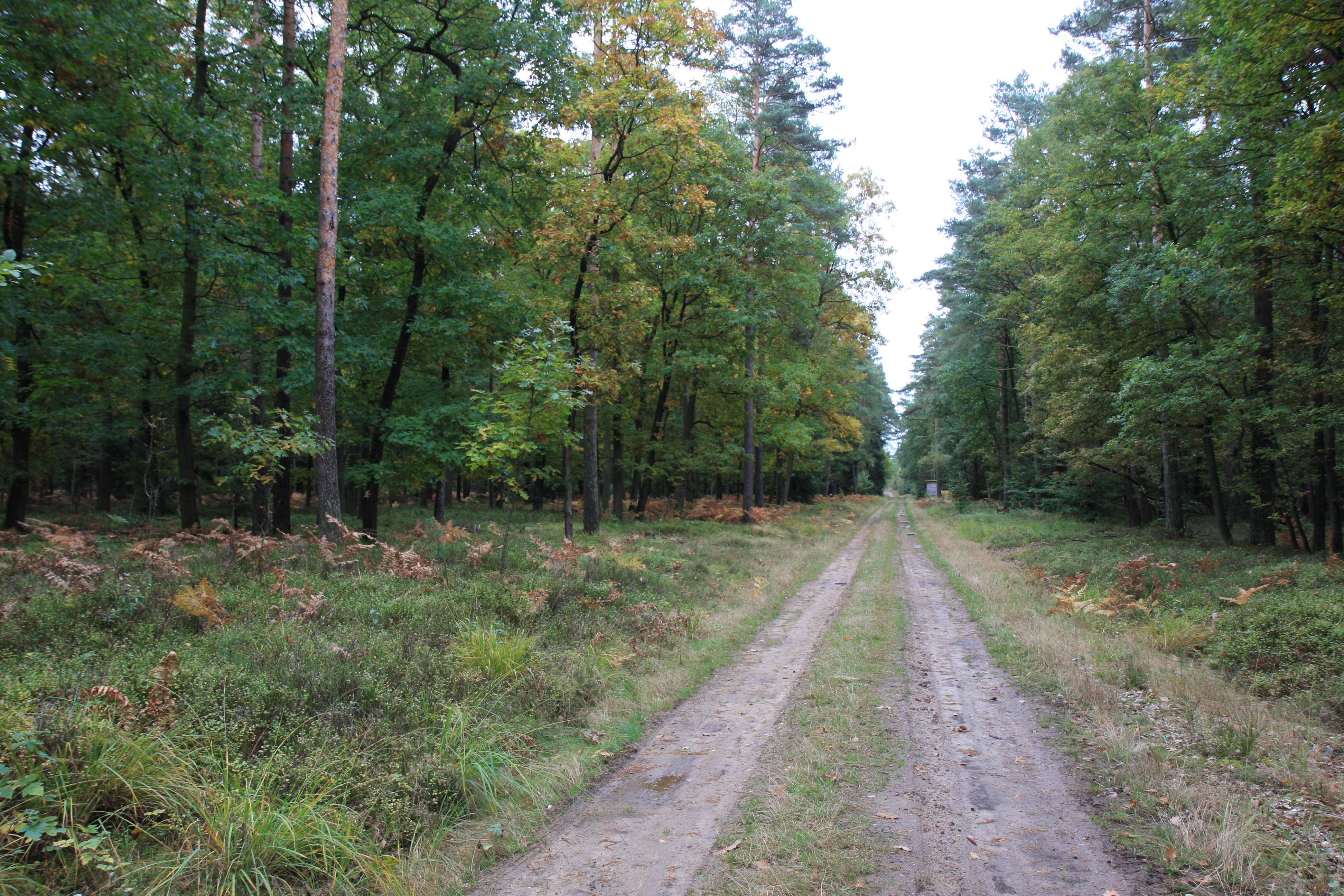 Blick von der Straße auf die Besucherkanzel in der Göhrde Richtung Röthen